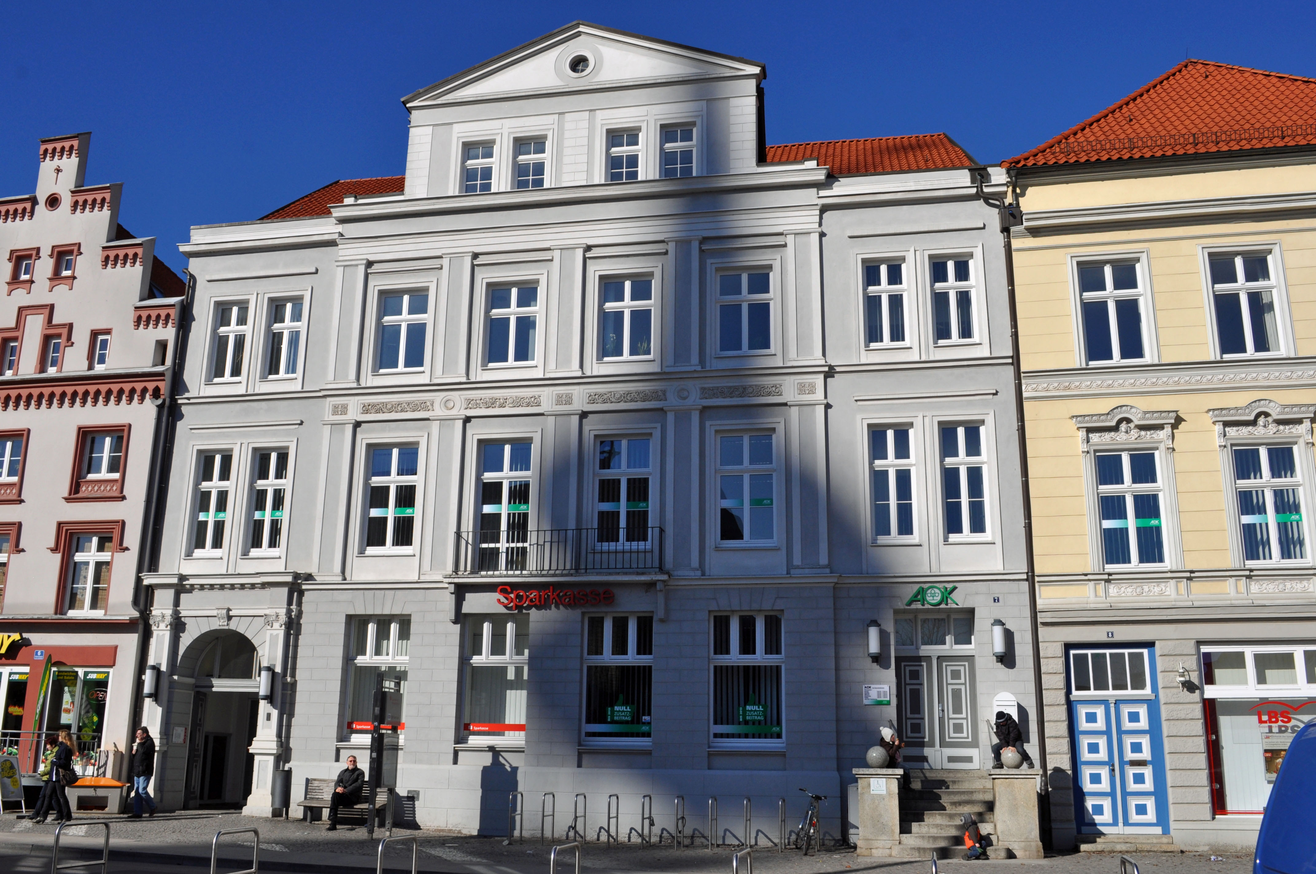 Gebäude bzw. Gebäudedetail in Stralsund. Straße und Hausnummer siehe Dateiname. Das Gebäude ist als Baudenkmal ausgewiesen, siehe dazu die Liste der Baudenkmale in Stralsund.